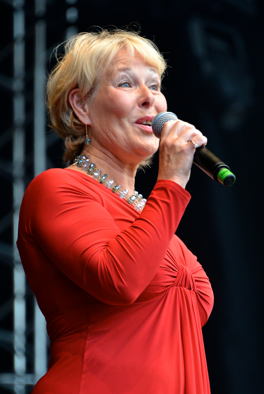 Birgitta Svendén på en konsert på Gustav Adolfs torg under Stockholms Kulturfestival den 17 augusti 2013.